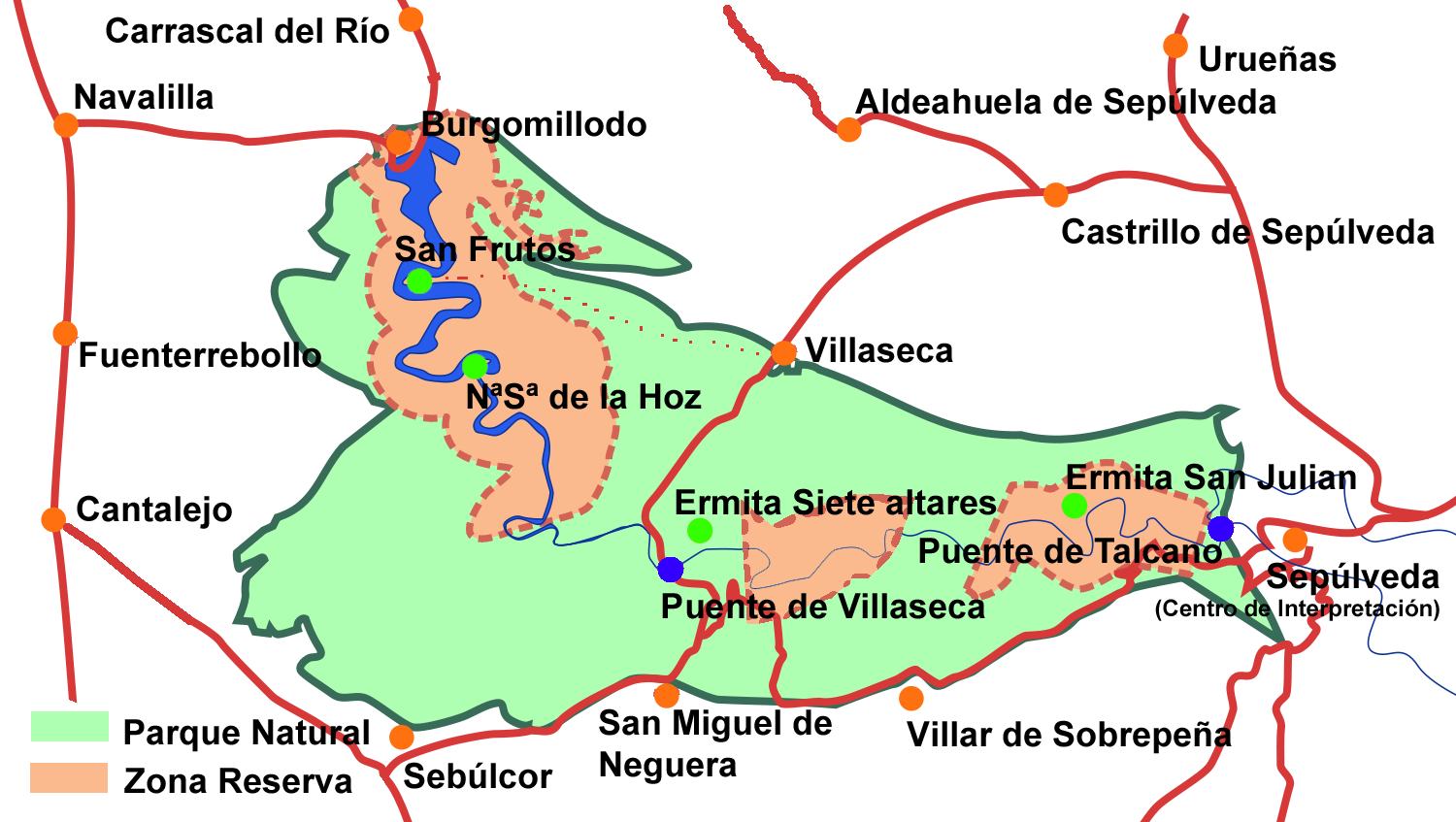 Mapa del Parque Nacional de las Hoces del Río Duratón rotulado